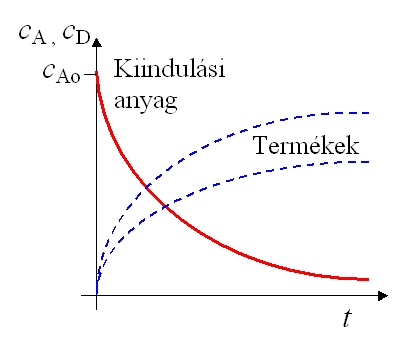 A koncentráció függése az időtől másodrendű reakció esetén